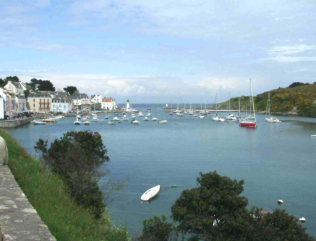 Description : Port de Sauzon à marée haute à Belle Ile Lieu : Sauzon, Belle Ile, Bretagne, France Auteur : Pline photo personnelle